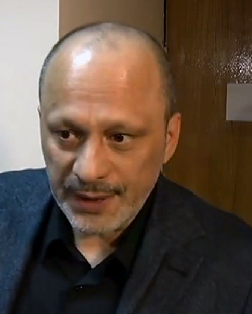 Зураб Григорович Аласанія — український журналіст. Генеральний директор Національної телекомпанії України.